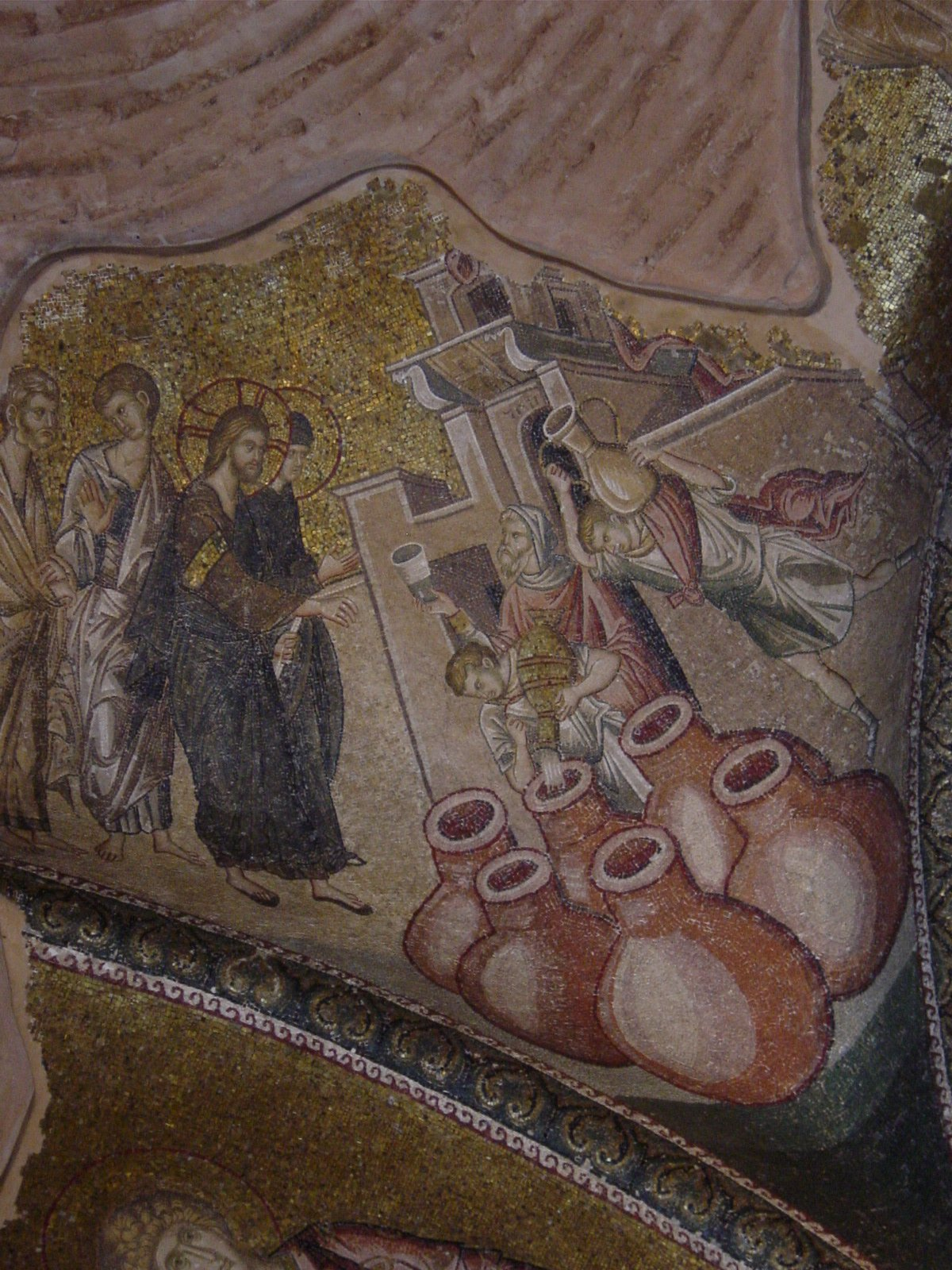 Istanbul: Museo di San Salvatore in Chora (Kariye Cami) - Esonartece. Mosaico raffigurante il miracolo delle Nozze di Cana. Foto di: Giovanni Dall'Orto, 29-5-2006.